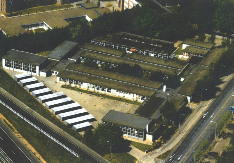 Sintermeertencollege Heerlen, noodgebouwen aan de J.F. Kennedylaan (rechts) en de A79 (links) op de achtergrond (boven)de Open Universiteit Nederland